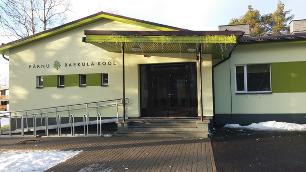 Pärnu Raeküla School Lembitu 1A